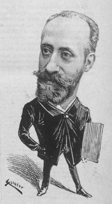 Apeles Mestres, caricaturizado por Ramon Escaler